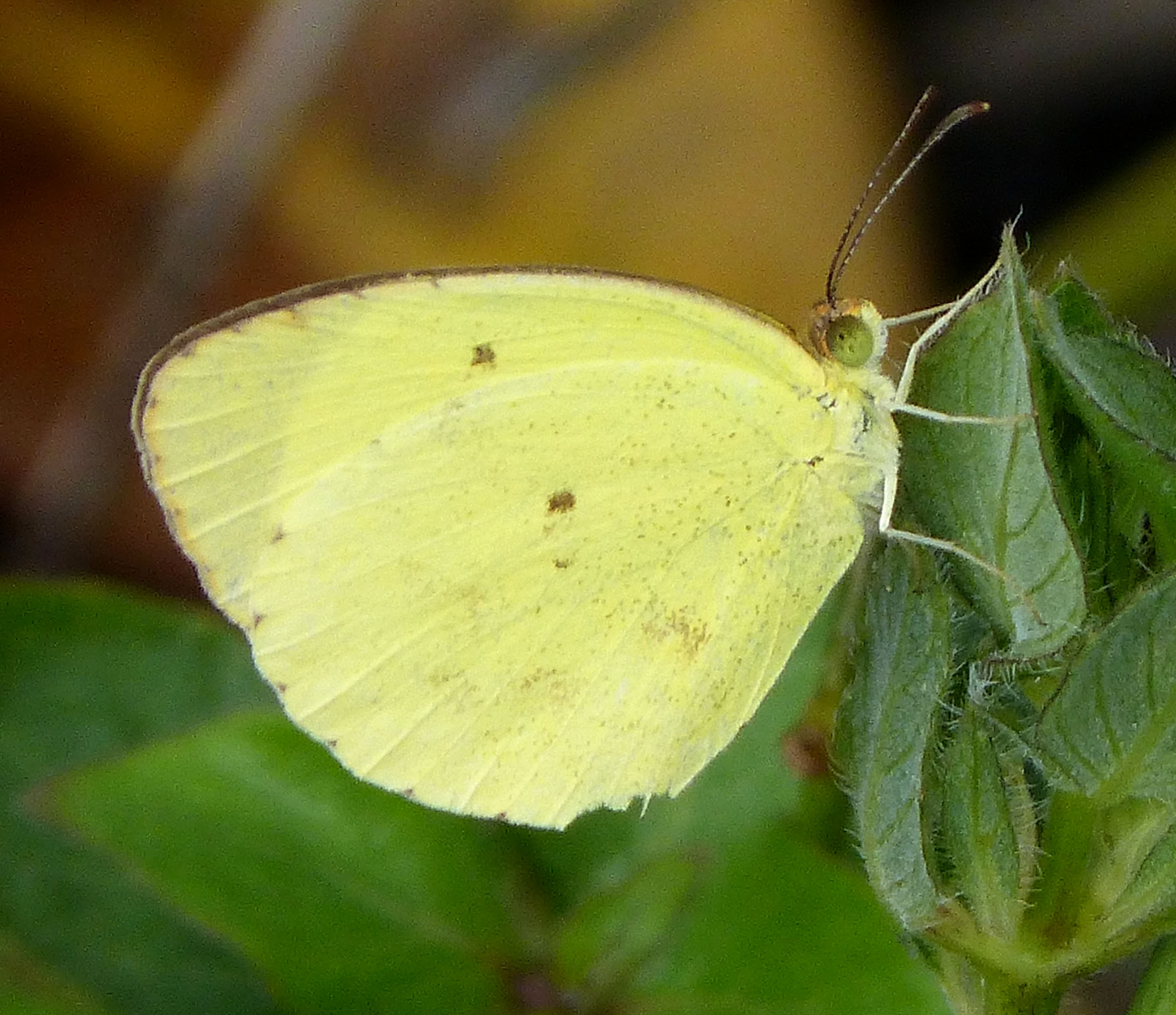 La Belen, Sierra de Najassa, Cuba